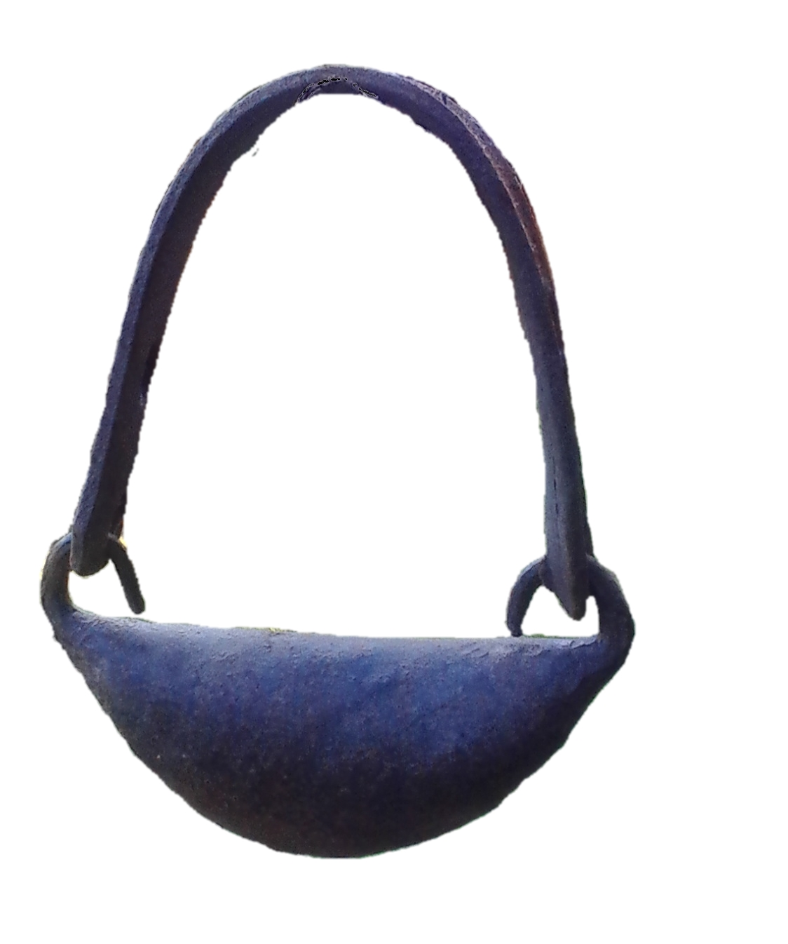 Ce grelot est fabriqué avec du fer fondu et moulé, aux bords duquel est fixé une lanière en cuir. Il est mis autour du cou d'un chien de chasse et permet de le distinguer, le suivre et d’effrayer le gibier lors d'une partie de chasse ou une battue.